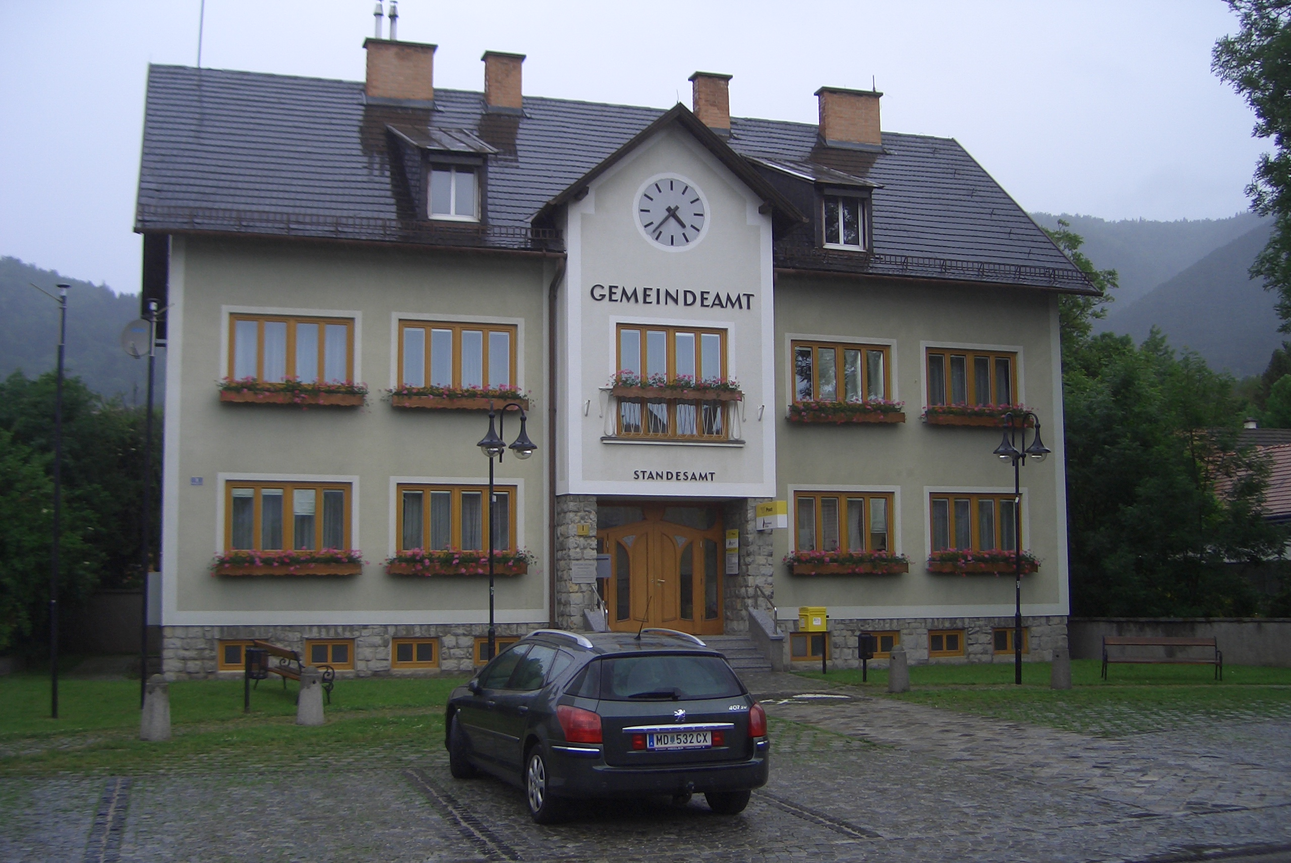 Grünbach am Schneeberg, Wiener Neustädter Straße, Gemenideamt, Postamt